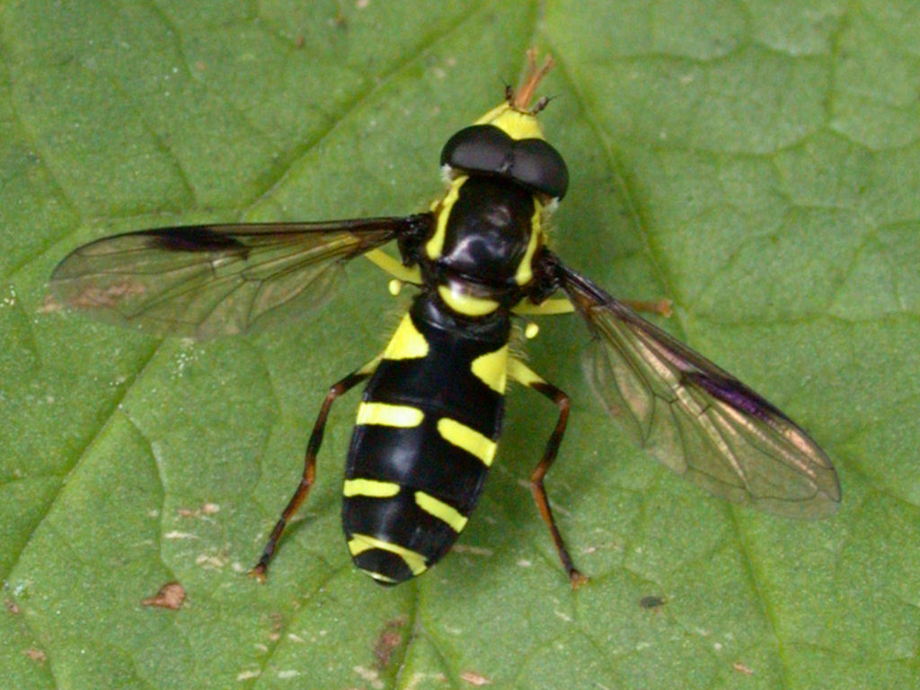 Xanthogramma pedissequum (Diptera: Syrphidae)